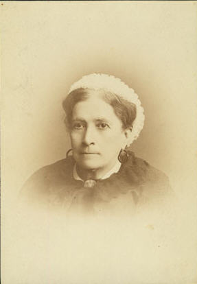 Juliet Opie Hopkins (1818-1890)